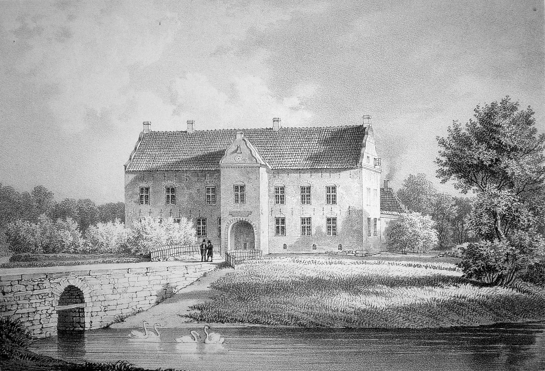 Sæbygaard er en herregård i Sæby Sogn i Frederikshavn Kommune. Siden 1988 har hovedbygningen været herregårdsmuseum som en selvejende institution under Sæby Museum.